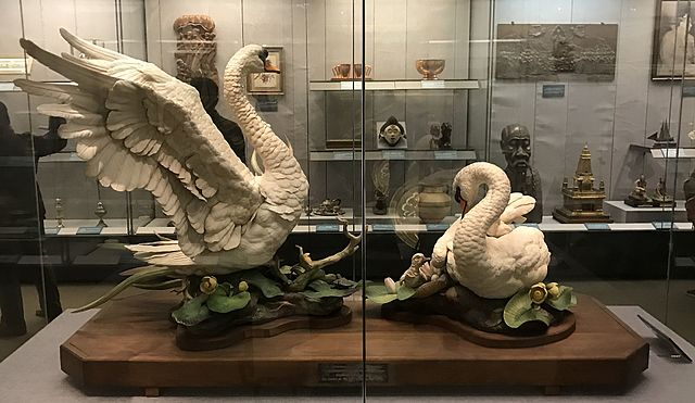 Dar pre Mao Ce-tunga od prezidenta Nixona pri návšteve ČĽR v roku 1972